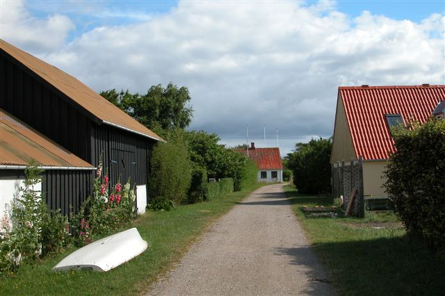 Birkholm cows